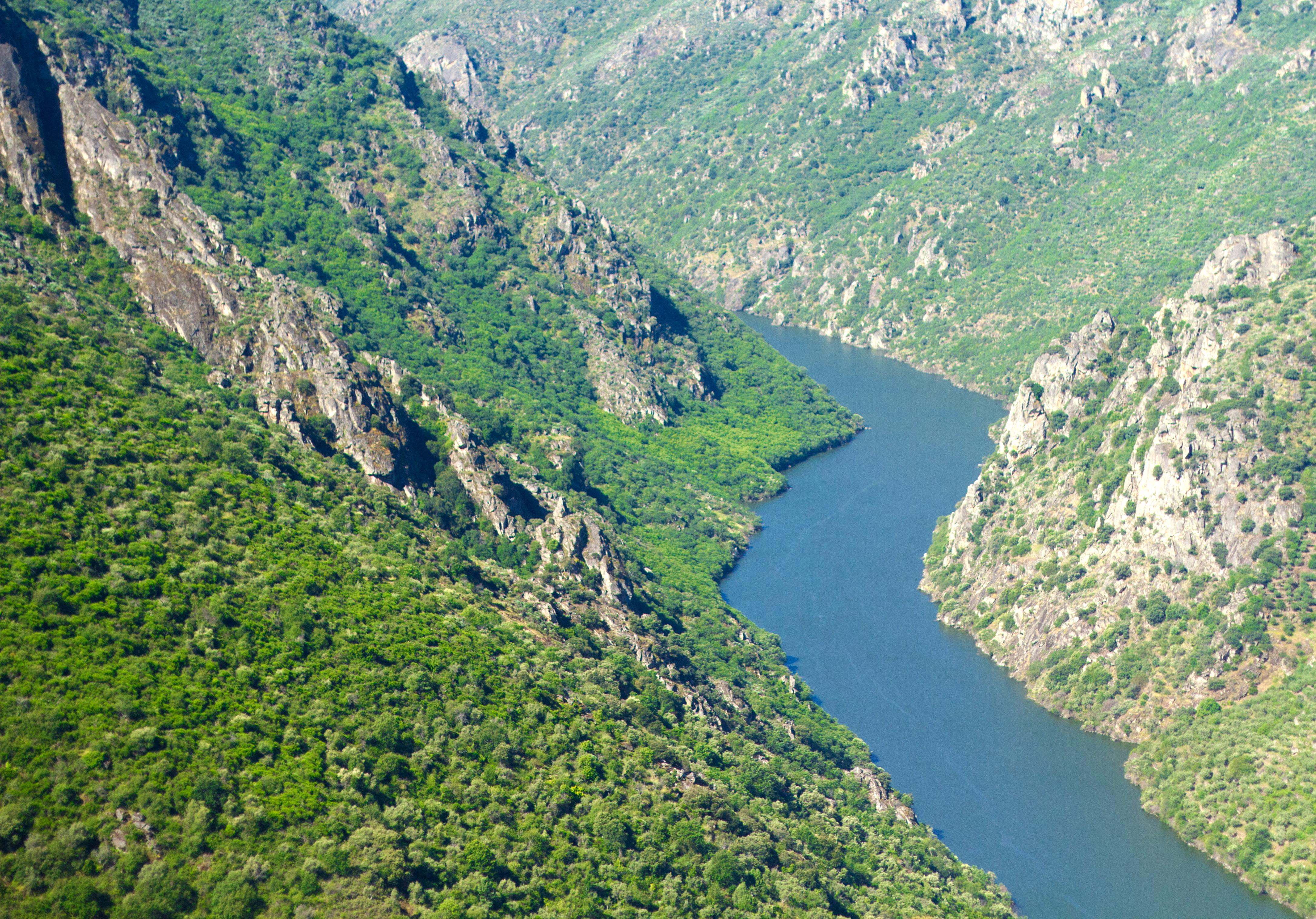 El almezal de Mieza visto desde el mirador del Colagón del Tío Paco, en el Parque Natural de Arribes del Duero, España.